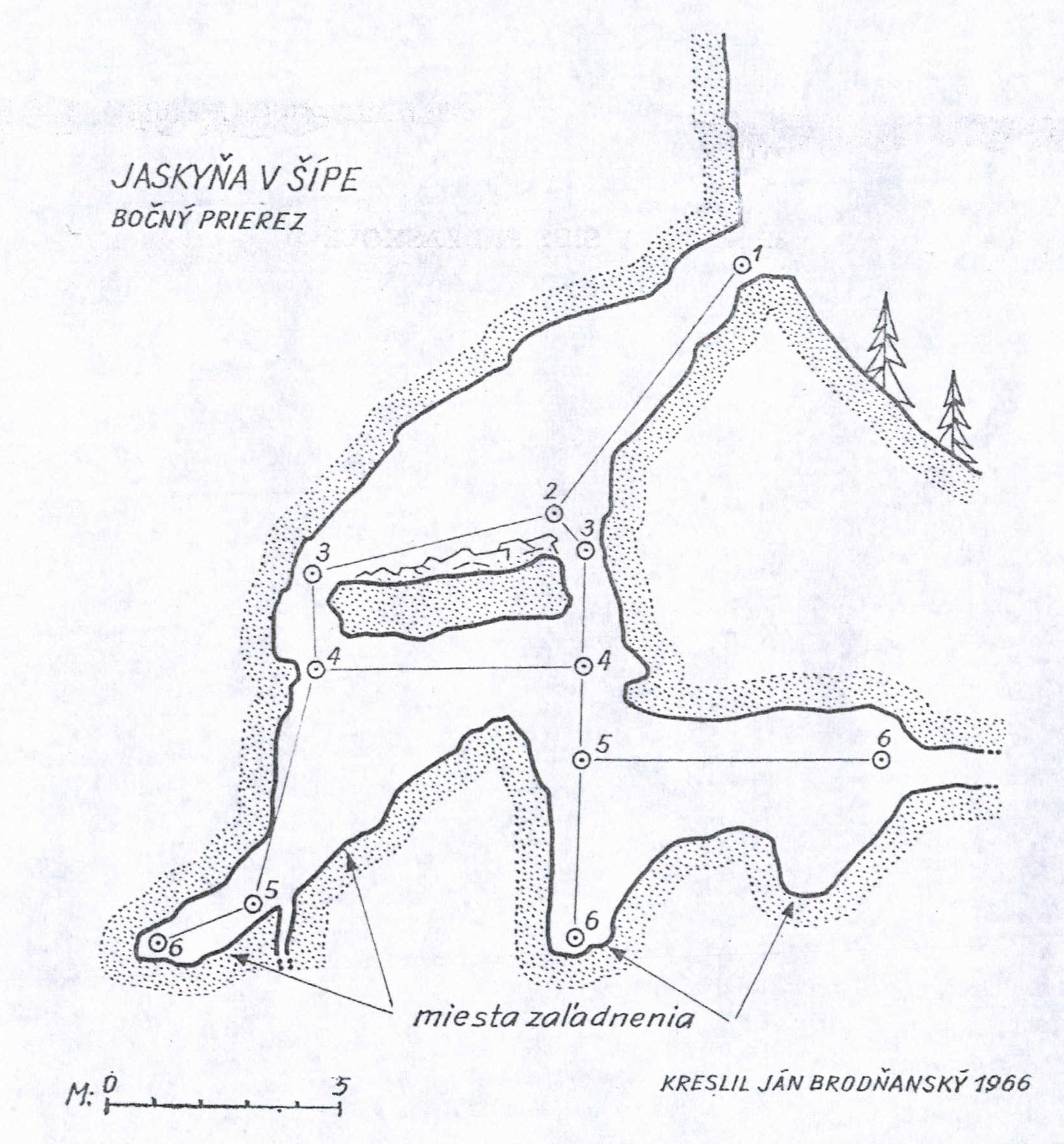 Jaskyňa v Šípe